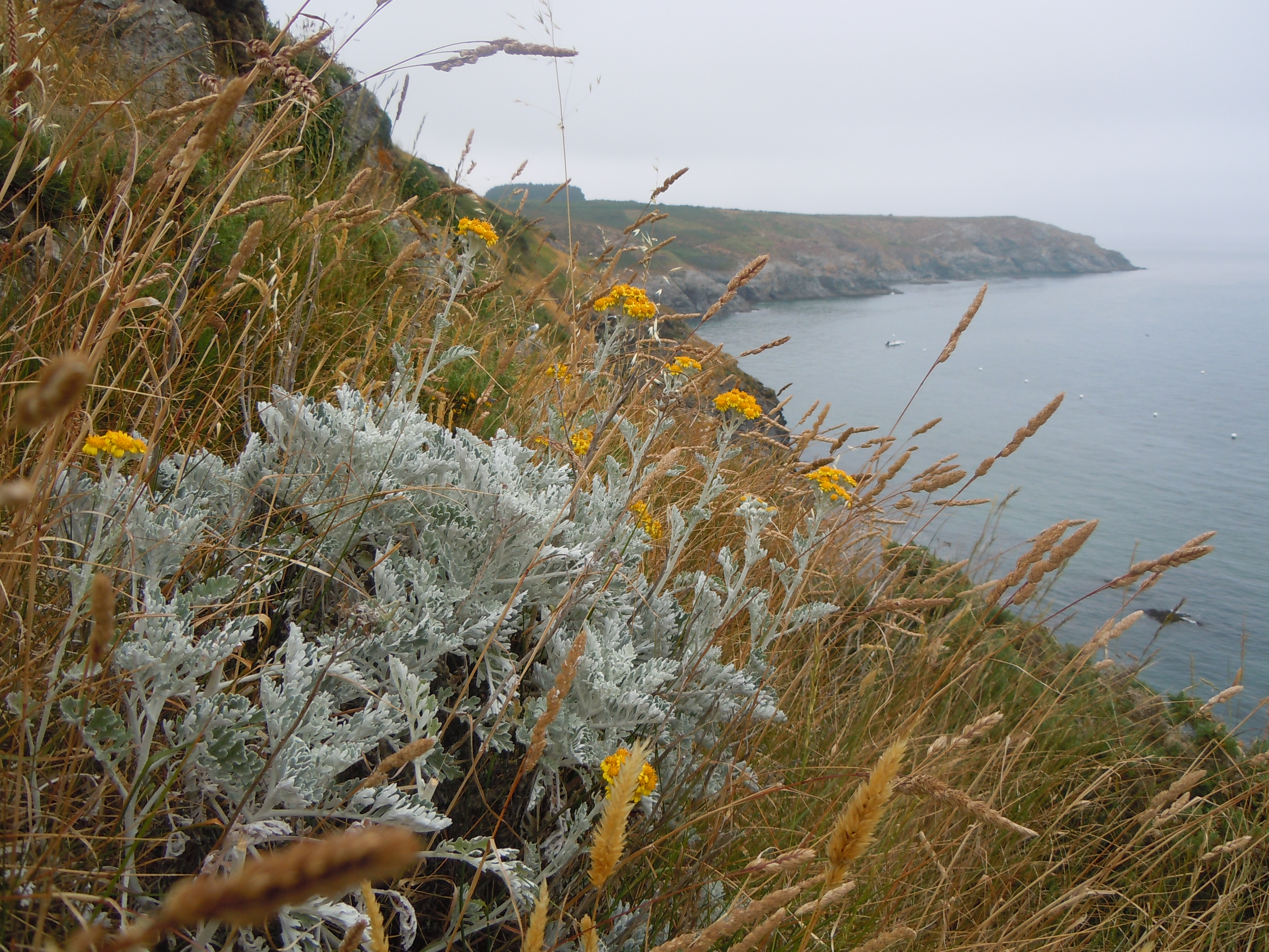 Séneçon Cinéraire - Belle-Île-en-Mer